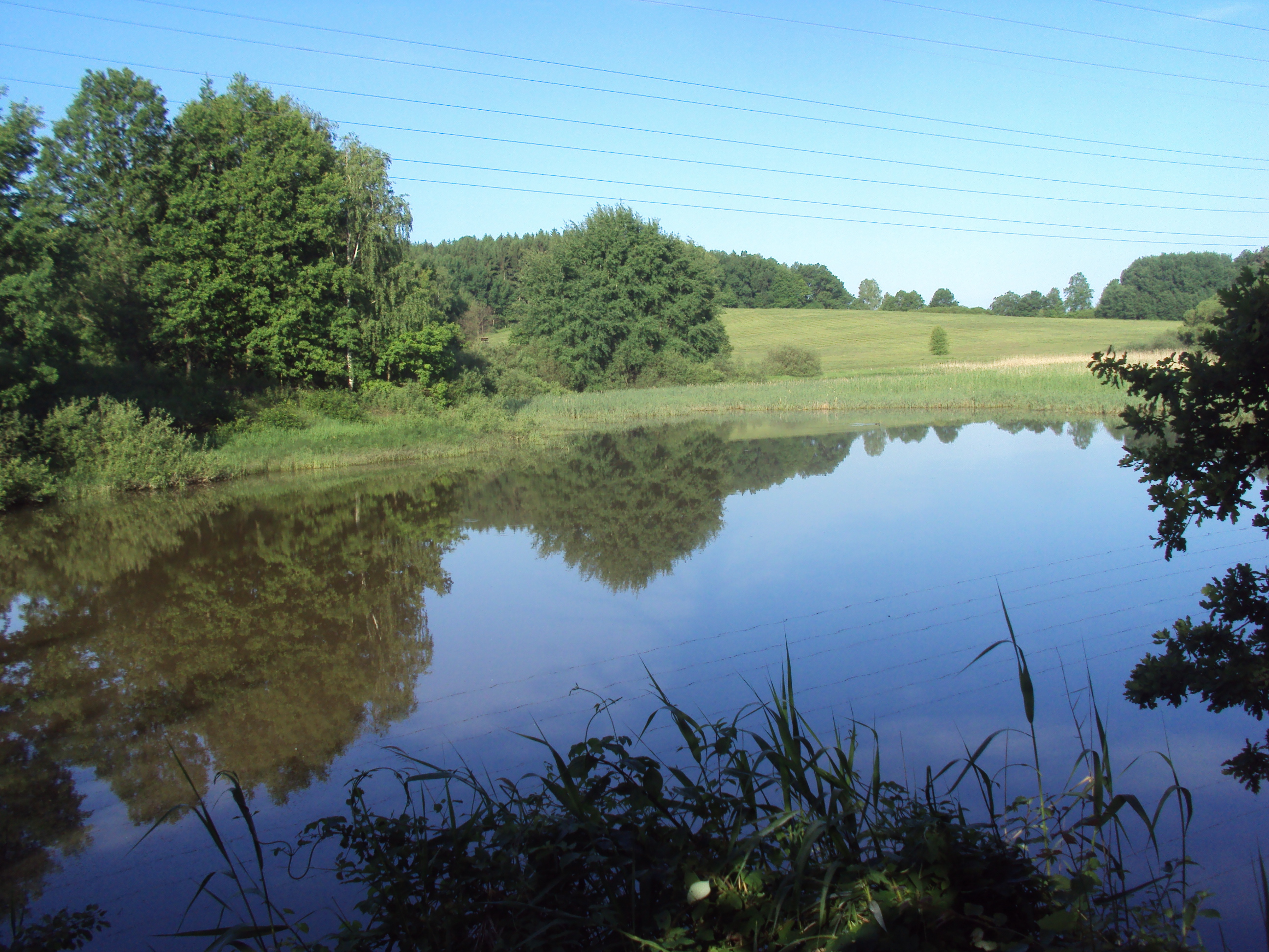 Rybník Souška je součást PP Cihelenské rybníky